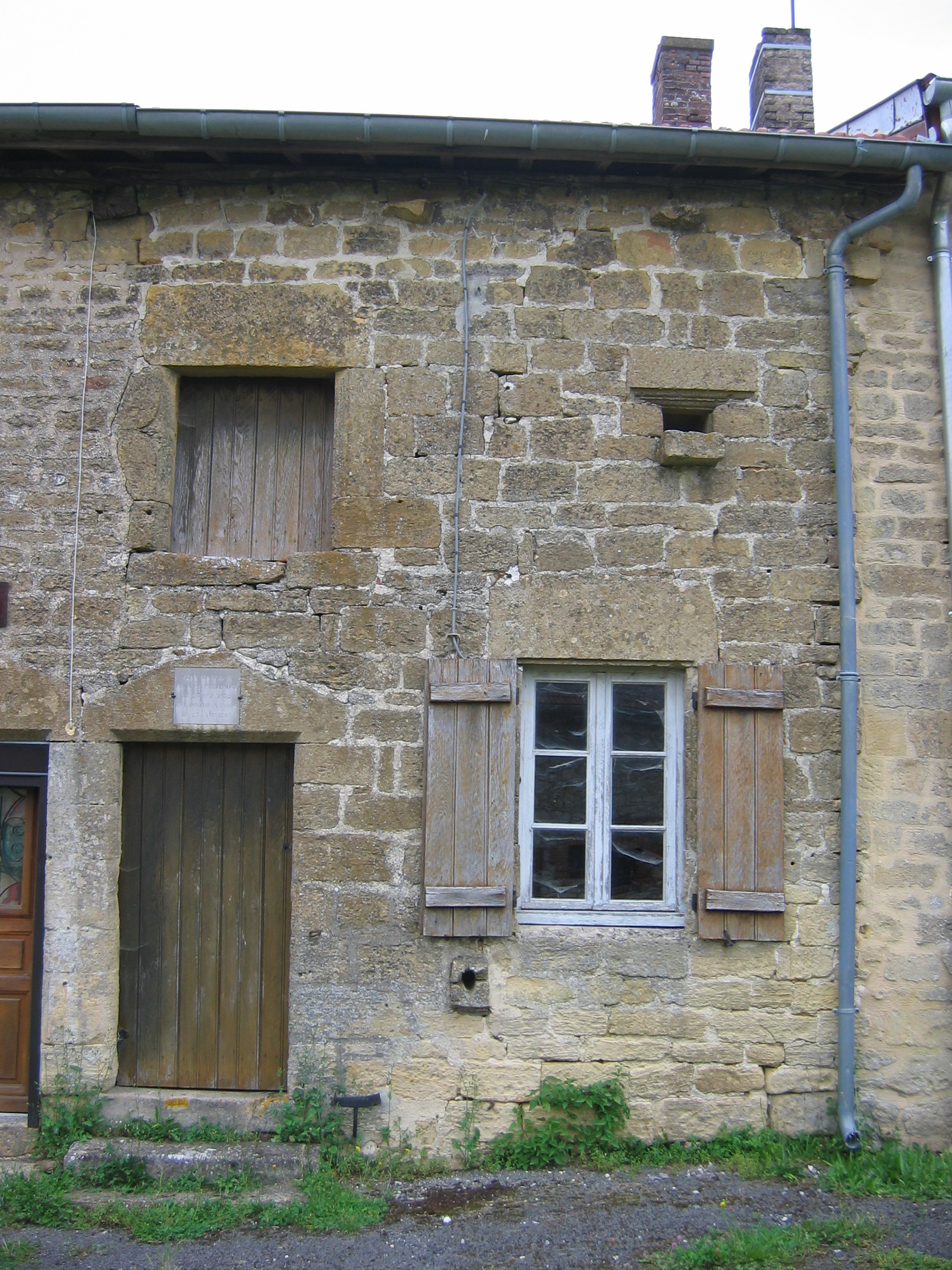 Maison natale de Jean Mabillon à Saint-Pierremont (Ardennes) France v1